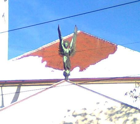 Detail: Josef Troyer: hl. Michael, 1954, auf dem Giebel des Langhauses der Grazer Münzgrabenkirche